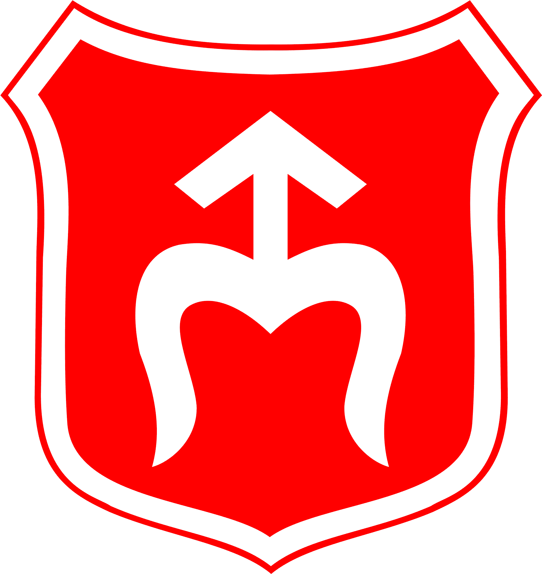 Herb Opoczna